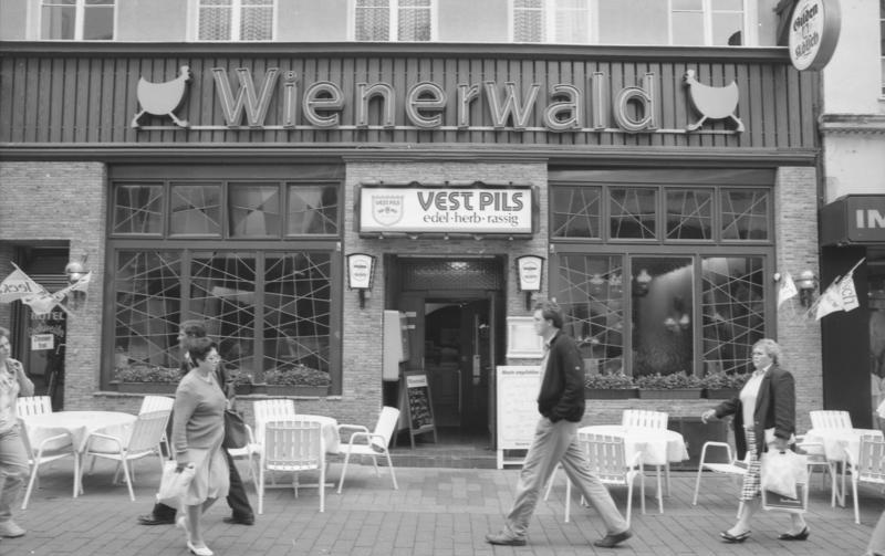 Juni 1988 Bonn- Innenstadt: Diverses